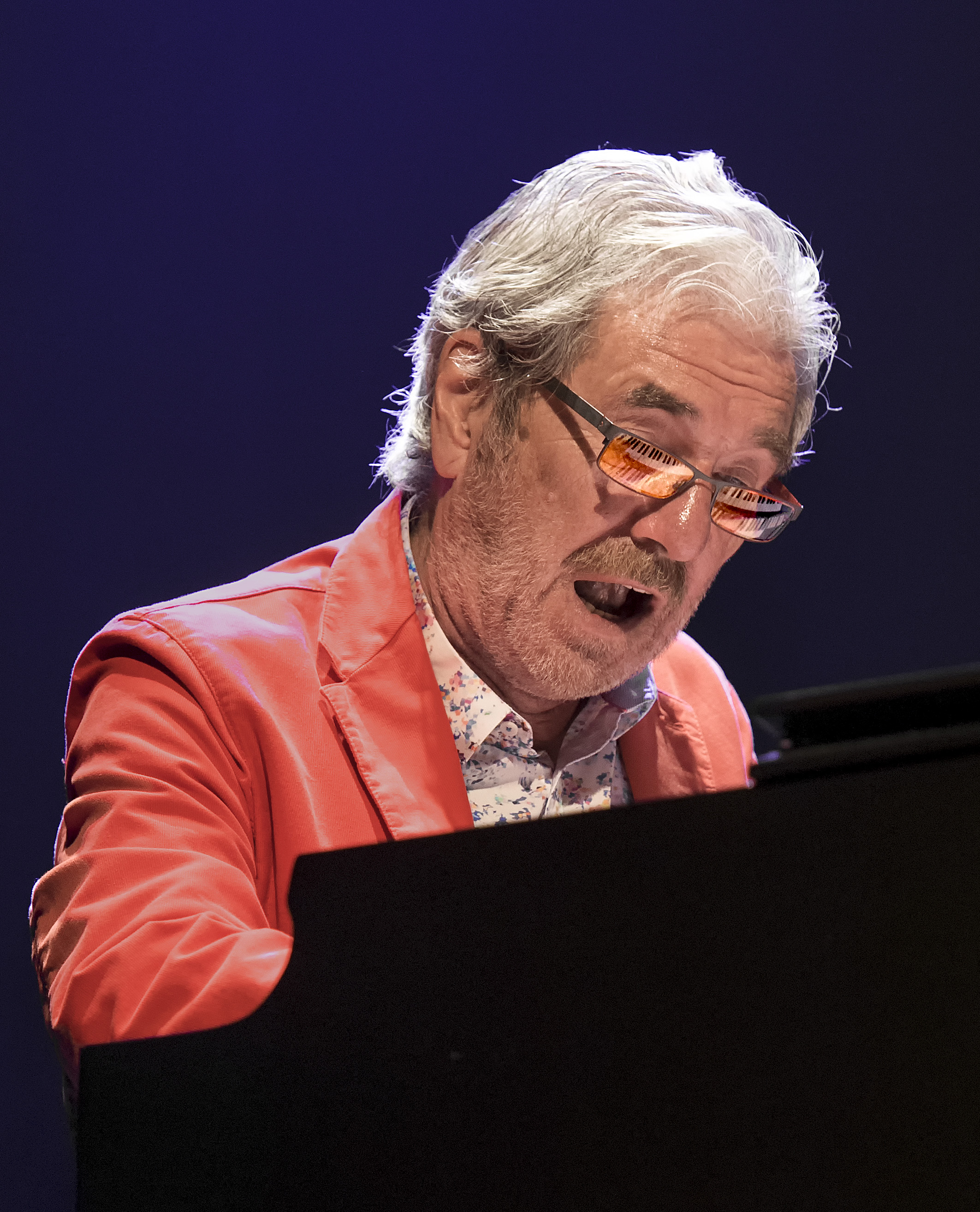 Met LSP Band in Aalst